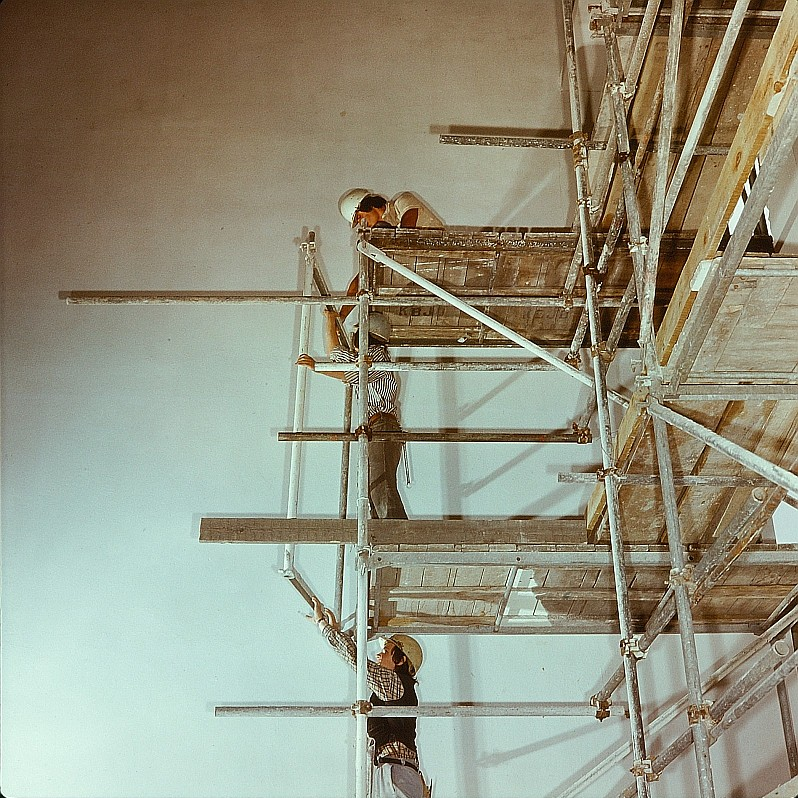 Original image description from the Deutsche FotothekZimmerer, Lagerhalle